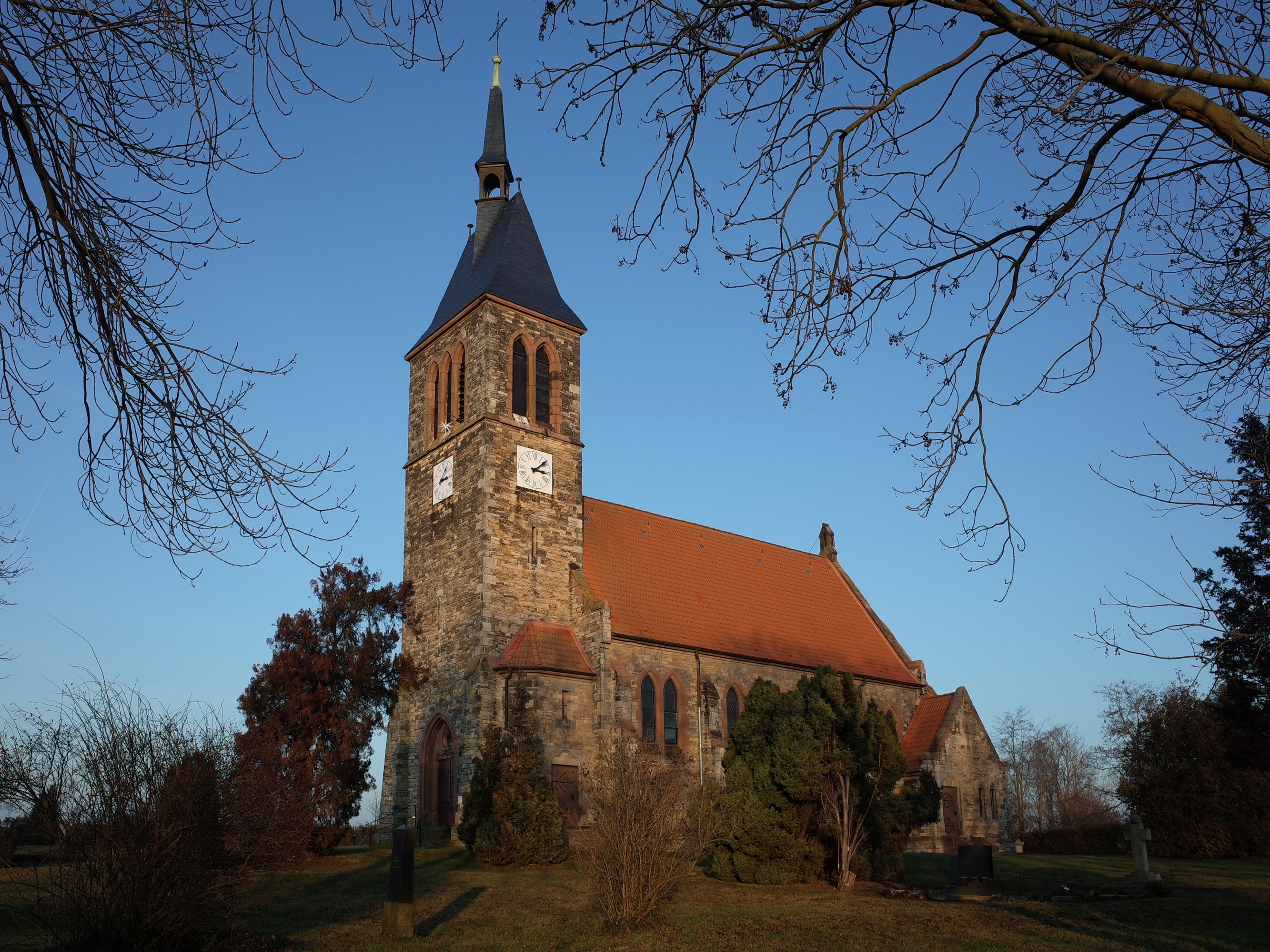 Nienburg (Saale), Kirche St. Petri im Ortsteil Gramsdorf. (Baudenkmal im Denkmalverzeichnis Sachsen-Anhalt, Erfassungsnummer: 094 97654 000 000 000 000 [1])